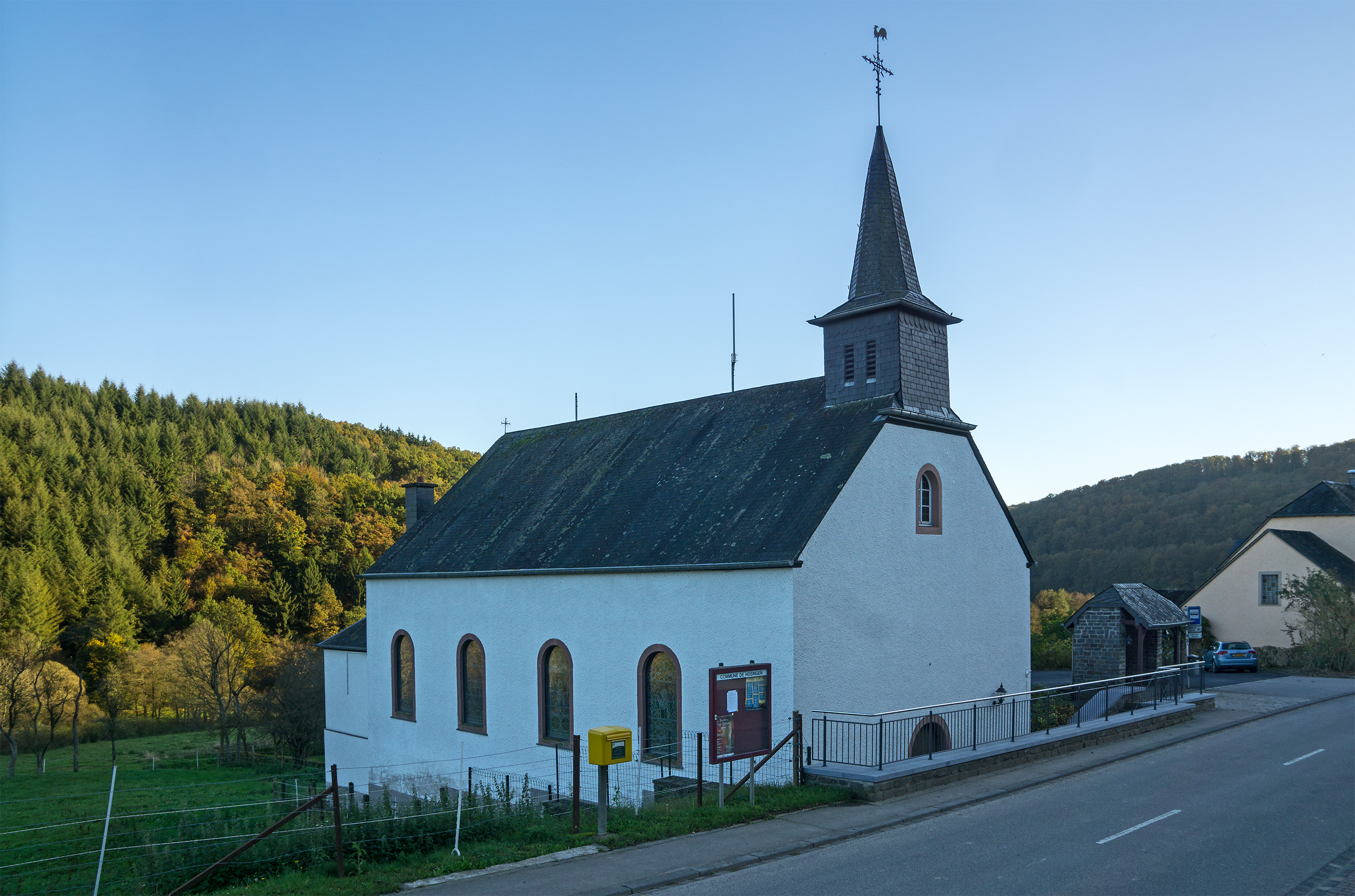 Kierch vu Rouderssen